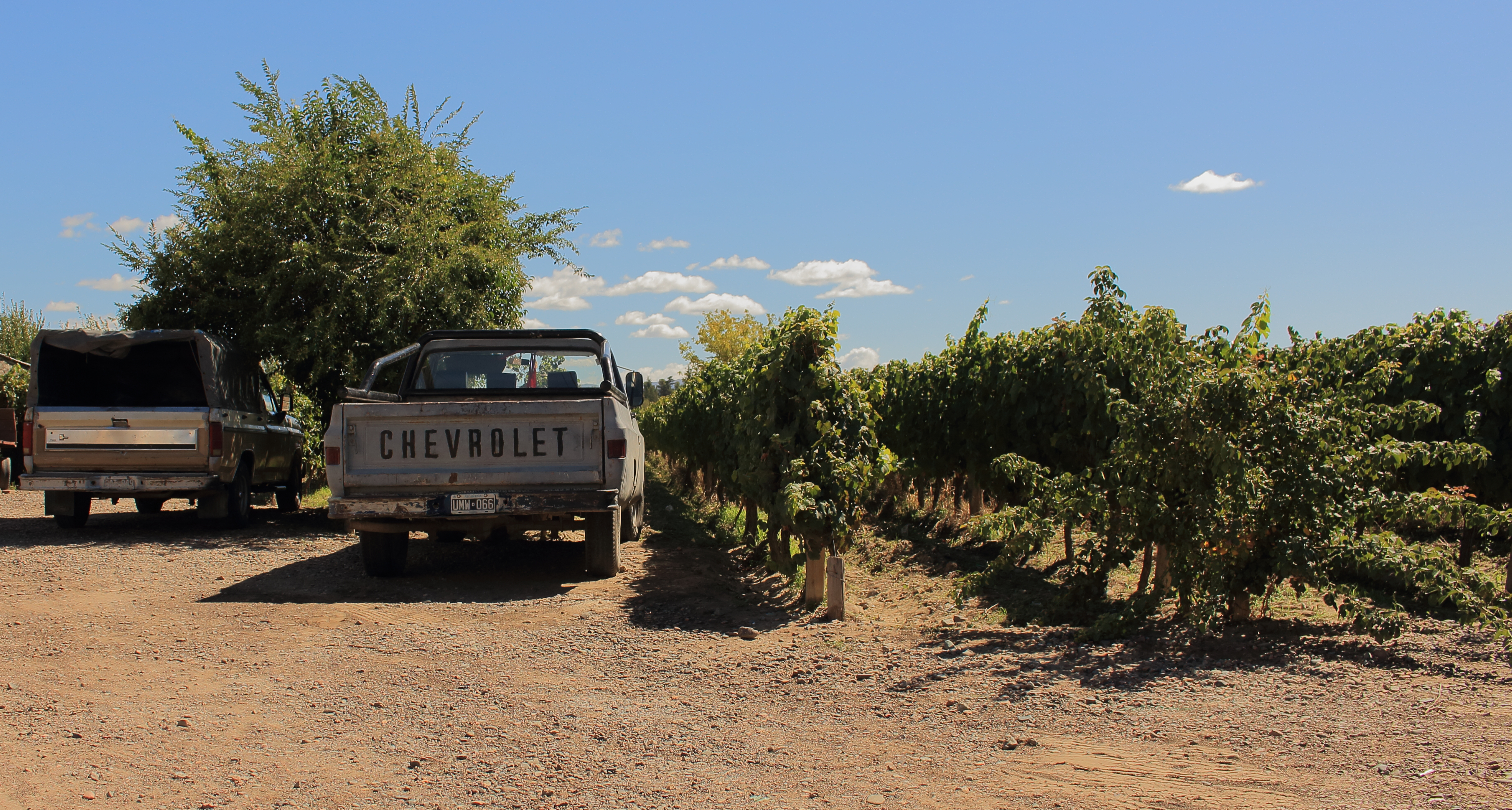 Tradicional escena de una finca de Tupungato en plena cosecha de uva.